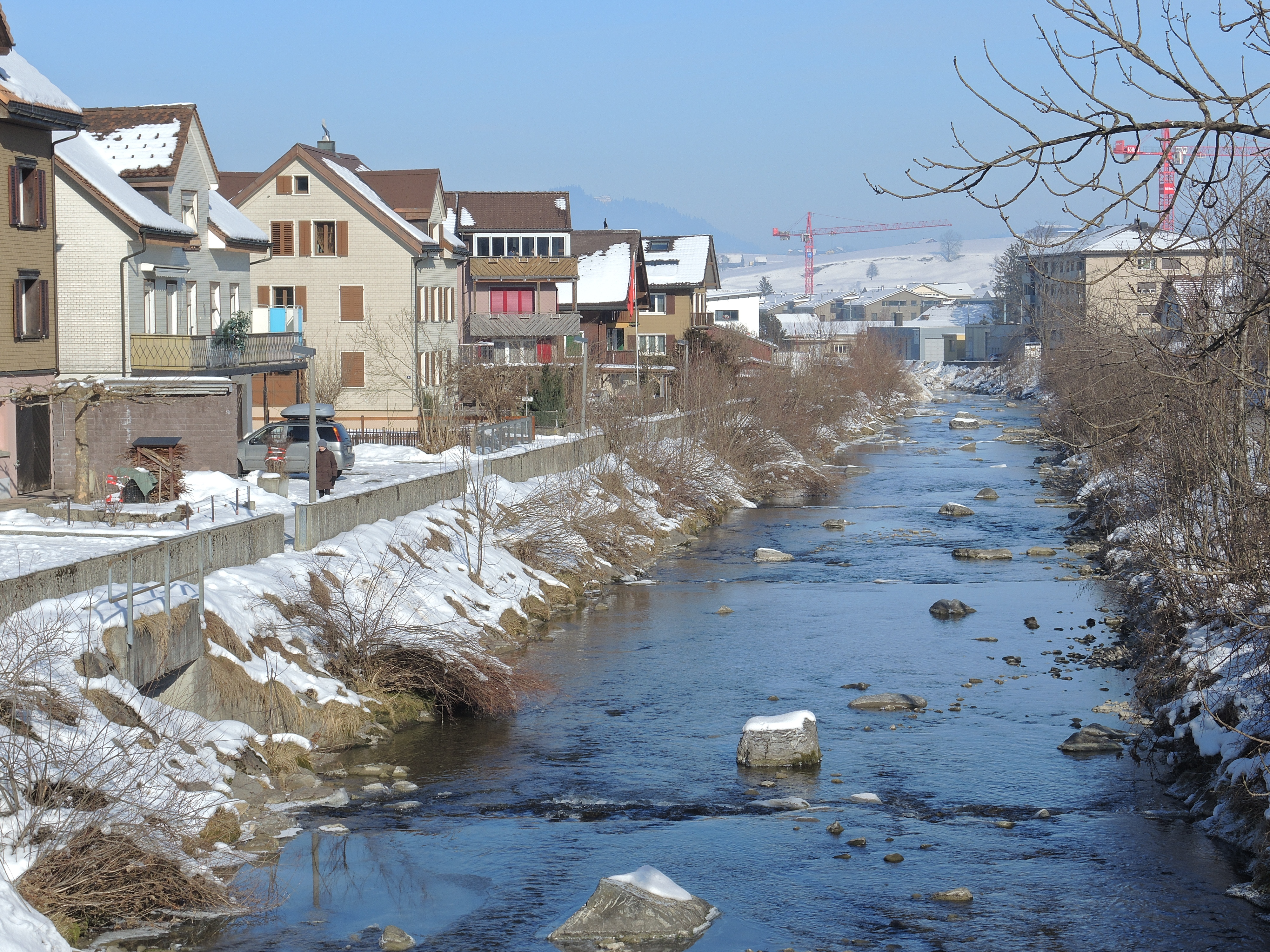 Alp in Einsiedeln (Switzerland)